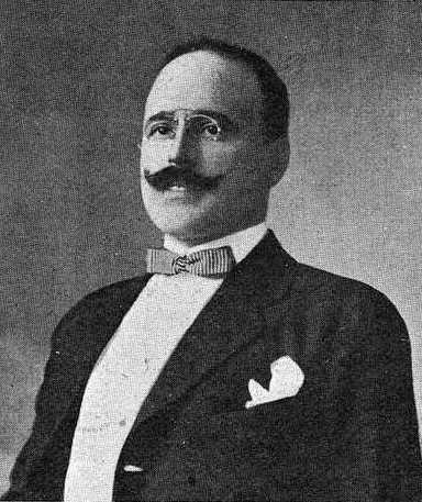 Prudencio Landín Tobío, fotografía en Vida Gallega 1917